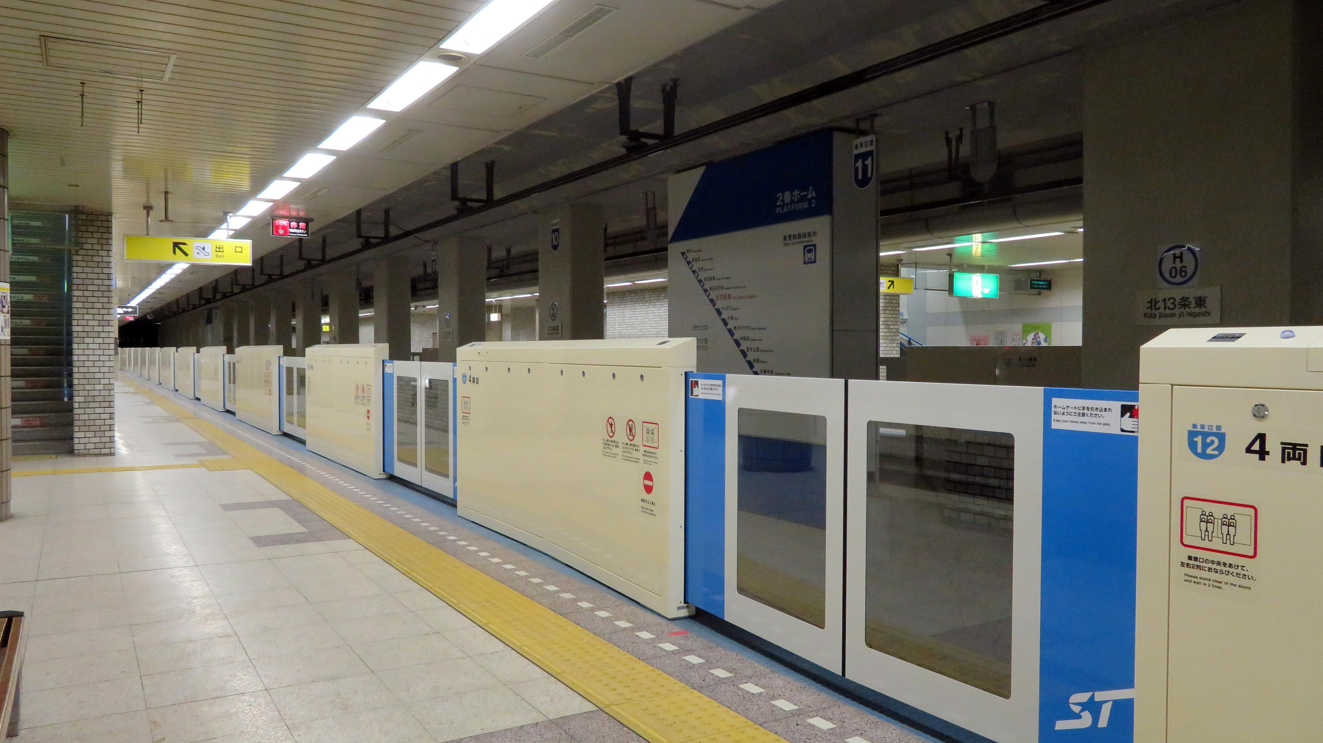 北13条東駅ホーム Canon PowerShot SX720 HS